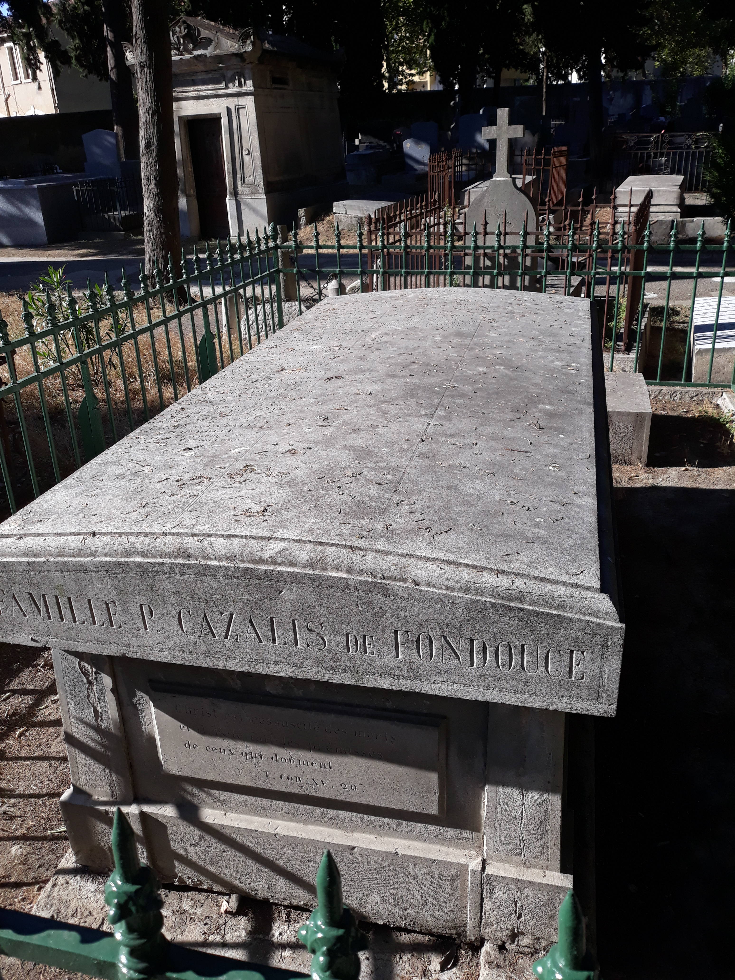 Das Grab des französischen Geologen Paul Cazalis de Fondocue auf dem protestantischen Friedhof Montpellier.